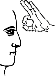 Hirnbatzl